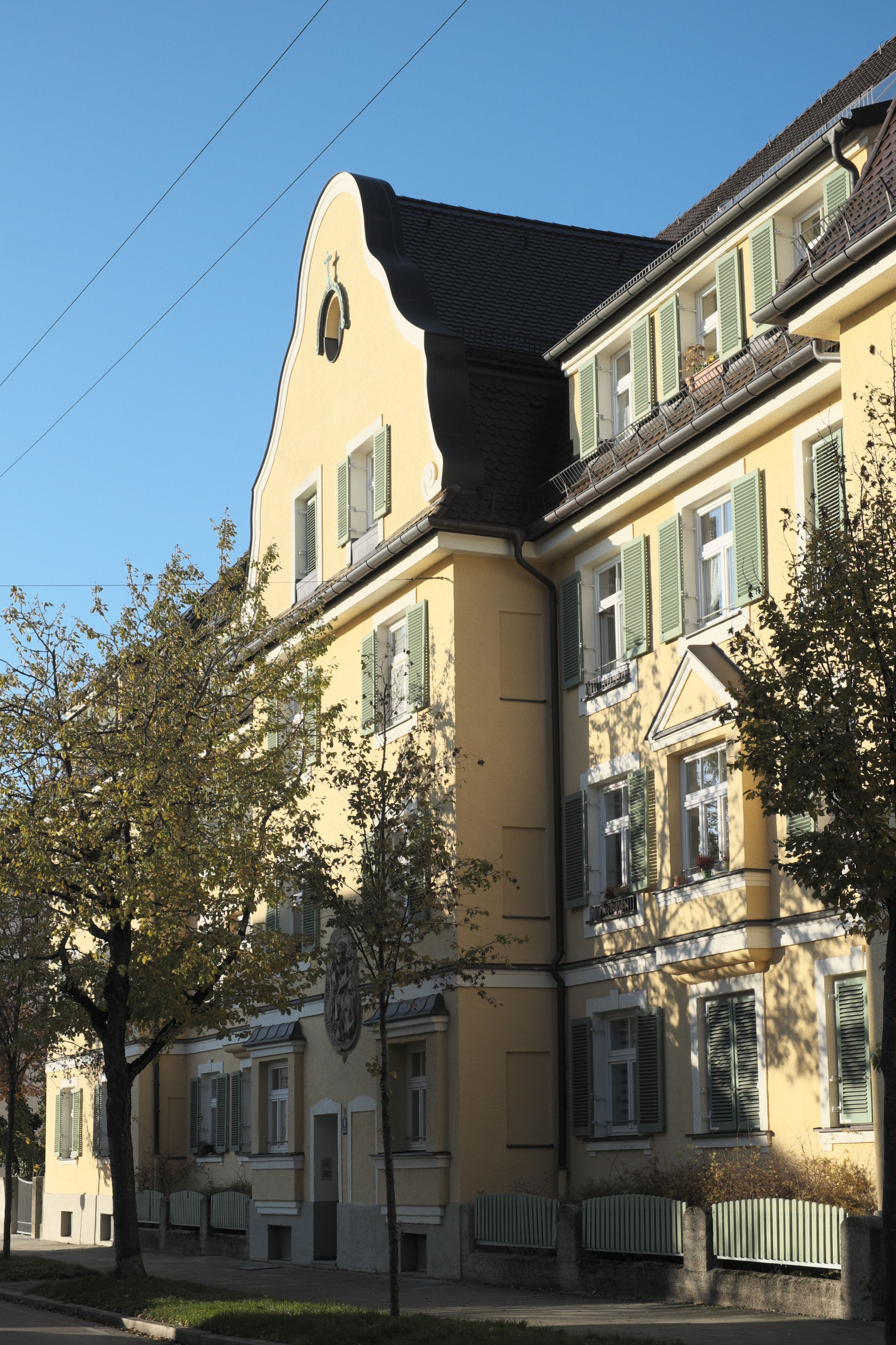 Ehemaliges Arbeiterwohnheim in der Peter-Putz-Straße 6/8/10 in Pasing im Stadtbezirk Pasing-Obermenzing in München (Bayern/Deutschland), 1914 von Josef Schormüller und den Gebrüdern Ott errichtet